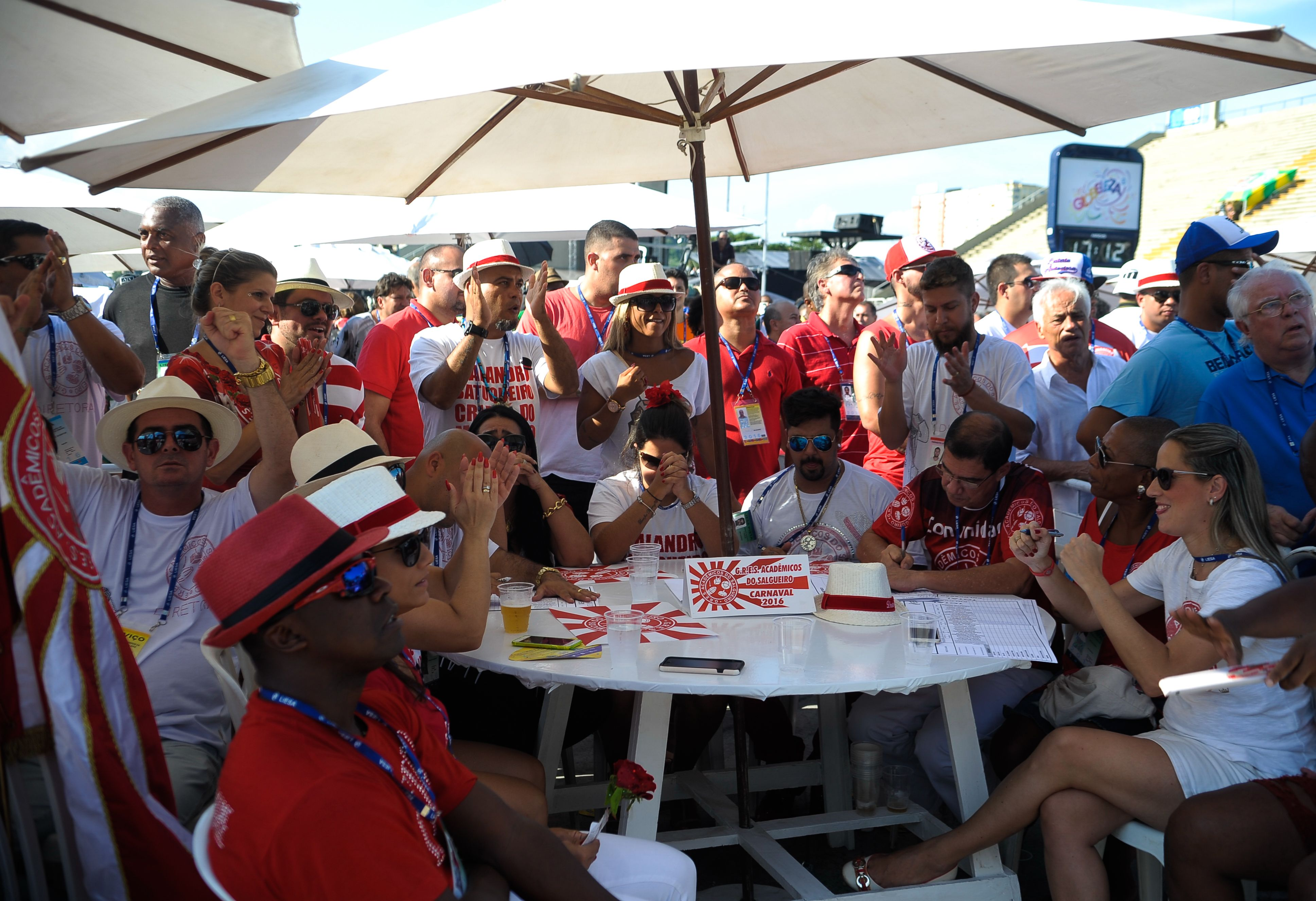 Rio de Janeiro - Escolas de samba do Grupo Especial aguardam início da apuração na Marquês de Sapucaí (Tomaz Silva/Agência Brasil)